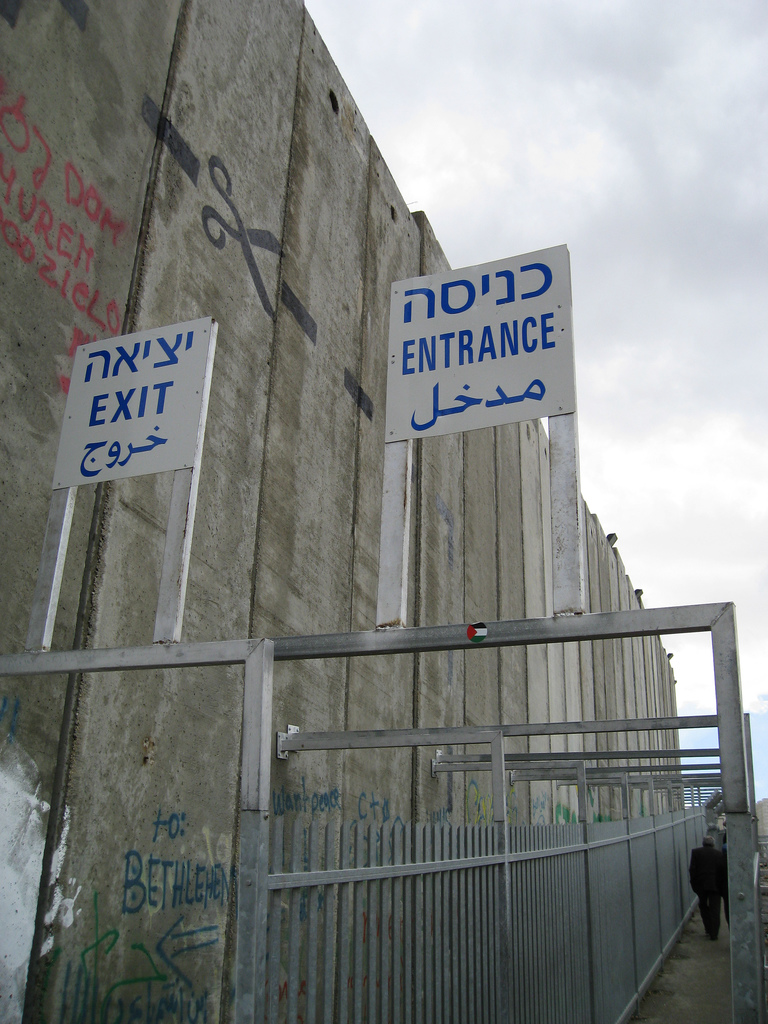 Palestine